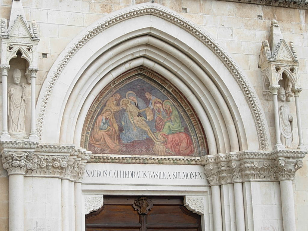 Particolare lunotto Cattedrale San Panfilo in Sulmona (AQ) Foto personale concessa in PD